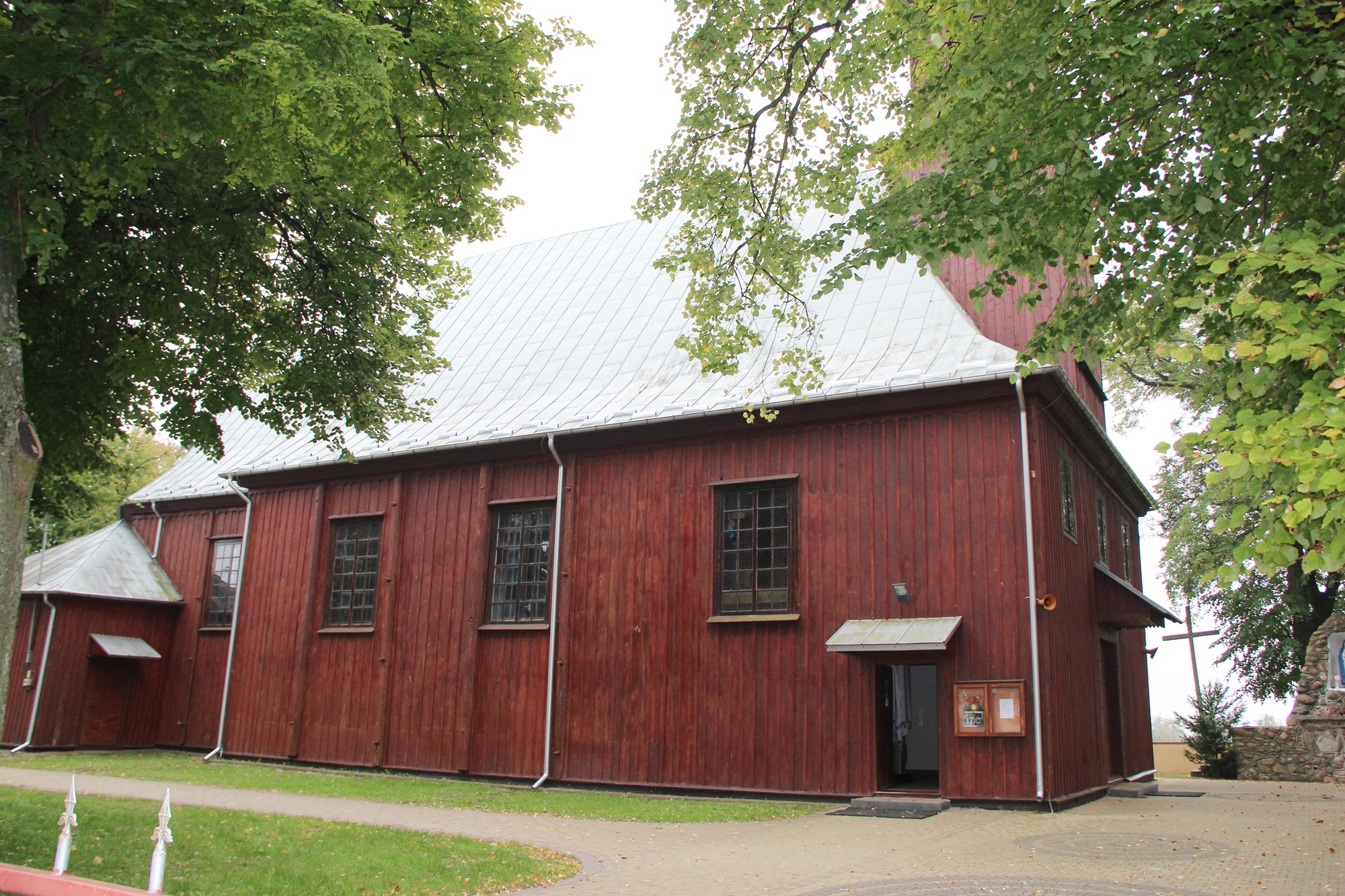 Wereszczyn - rzymskokatolicki kościół parafialny p.w. św. Stanisława Biskupa, 1783